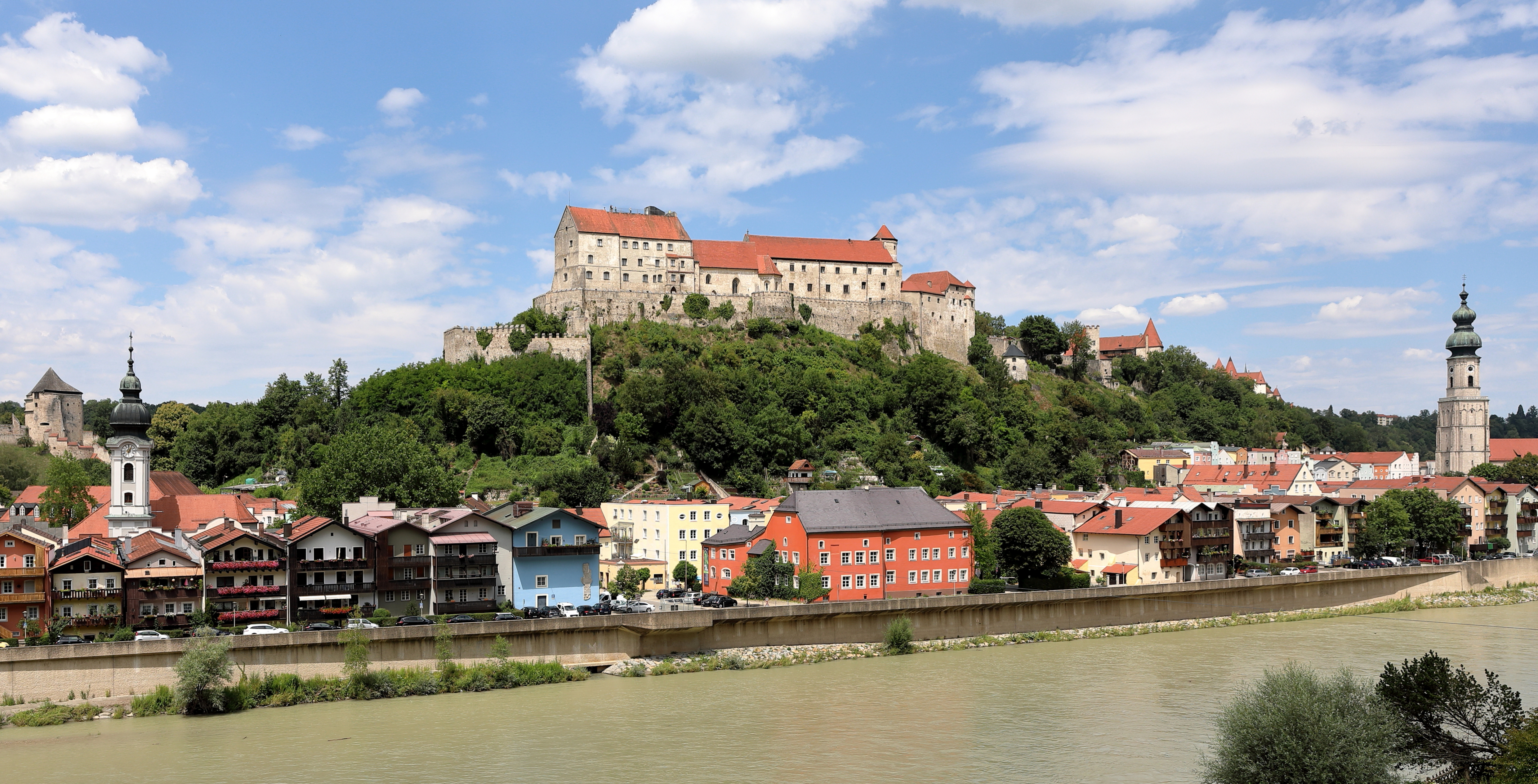 Südansicht der Altstadt der deutschen Herzogstadt Burghausen im oberbayerischen Landkreis Altötting.